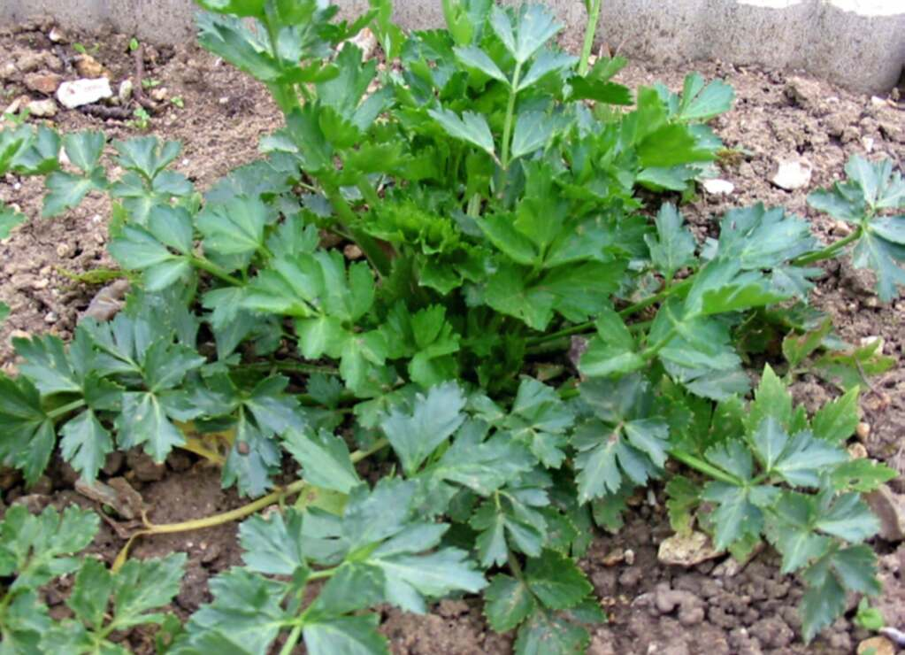 Céleri à couper (Apium graveolens) Photo JH Mora avril 2005